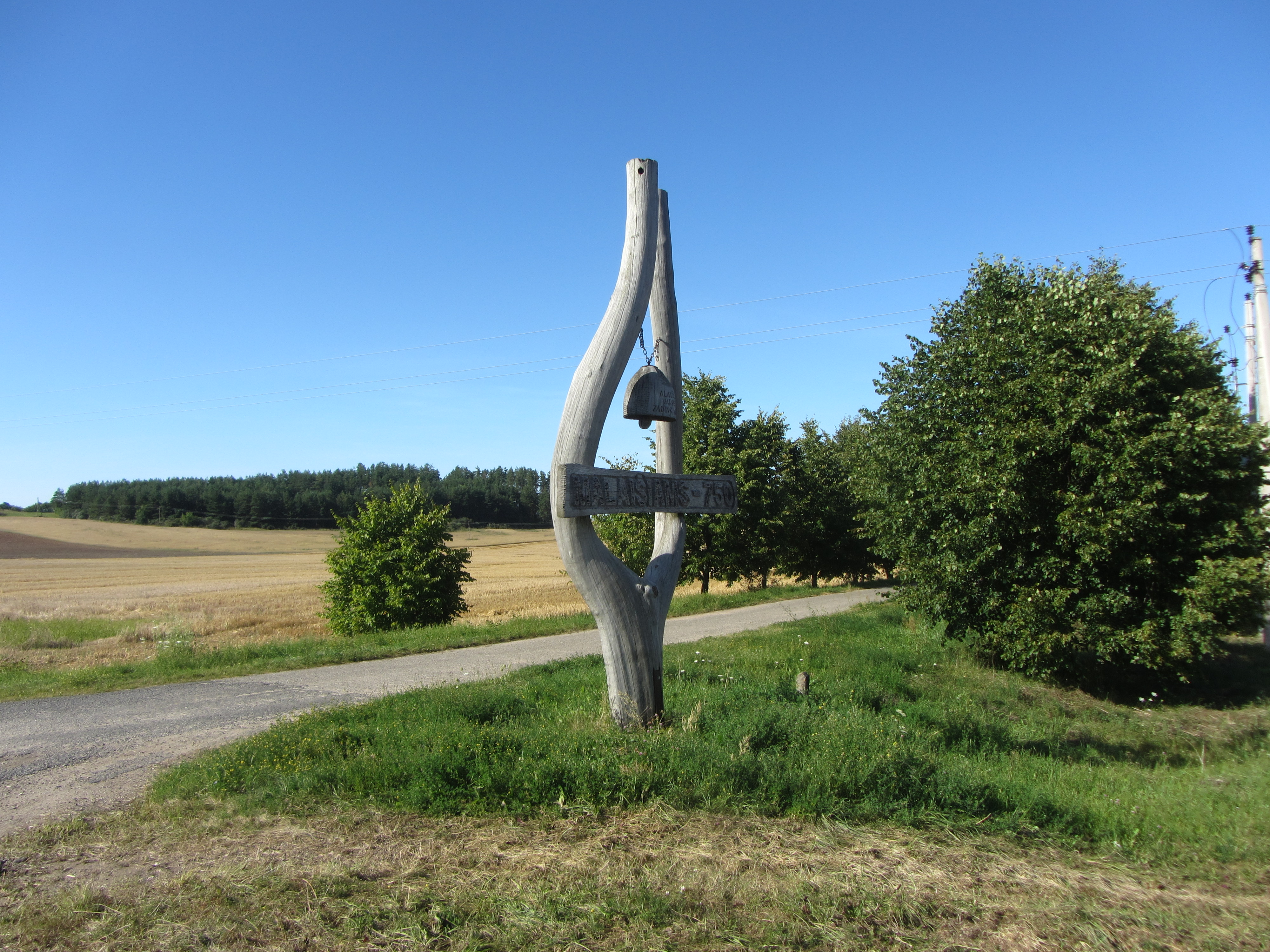 Svėdasų sen., Lithuania